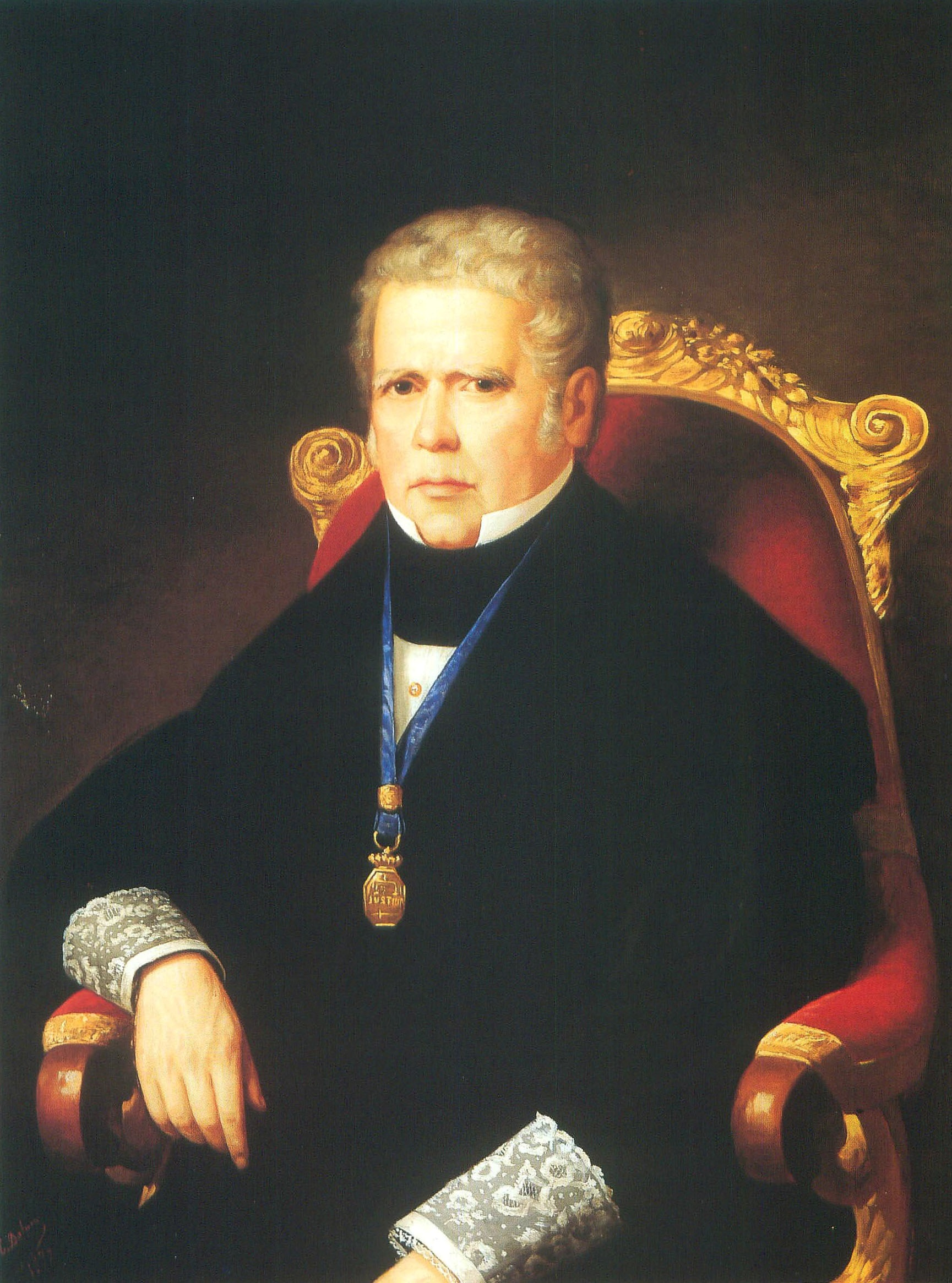 Retrato del político español Álvaro Gómez Becerra (1771-1855), que llegó a ser presidente del Consejo de Ministros de España en 1843, durante el reinado de Isabel II de España.